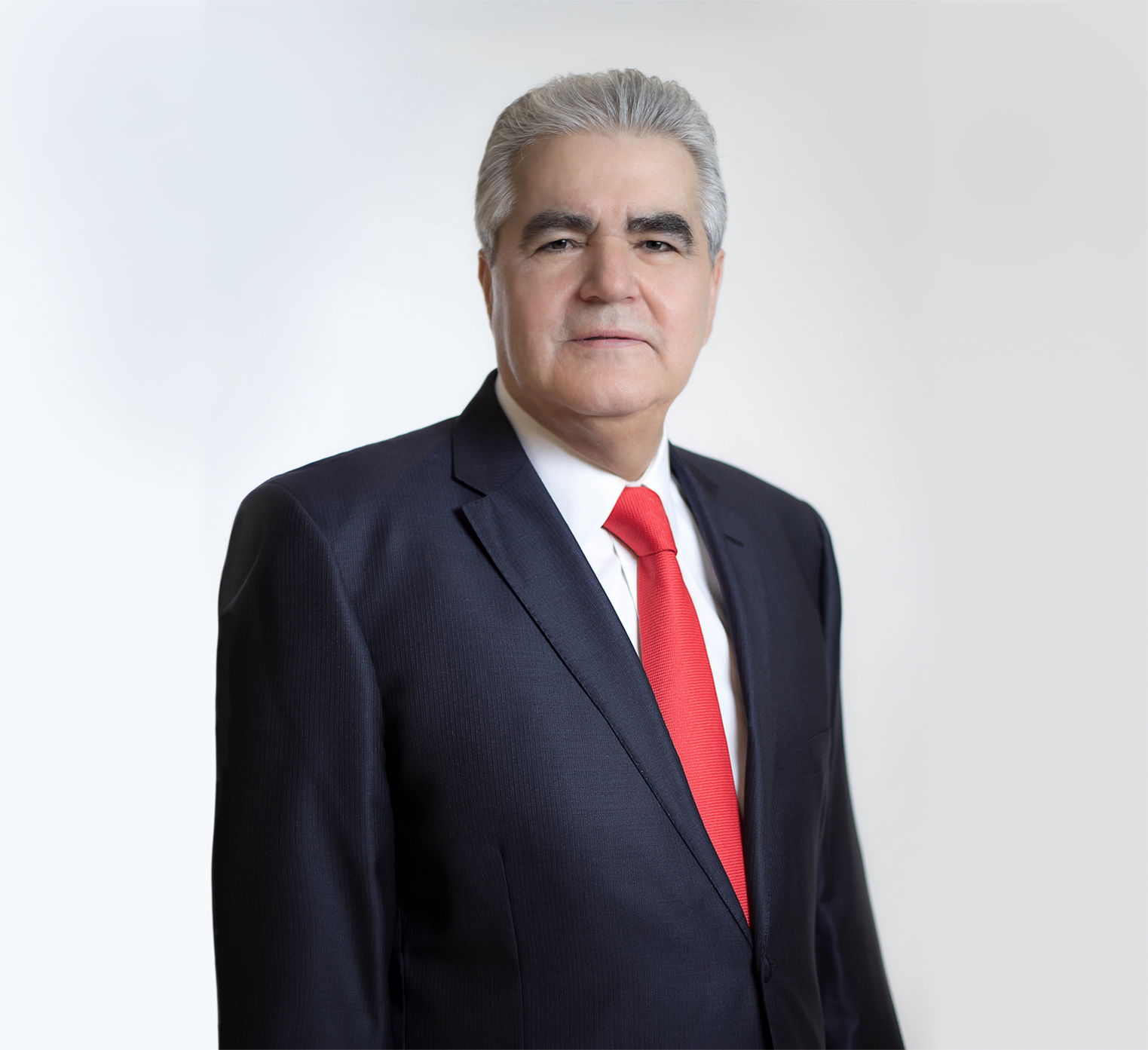 Fotografía de Oscar Javier Lara Aréchiga